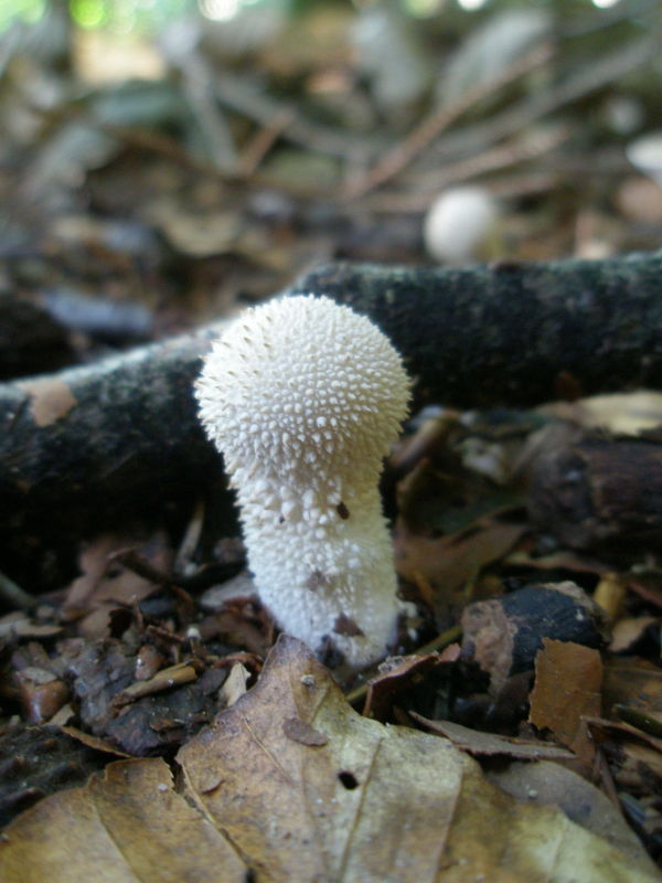 Il s'agit d'une vesse de loup perlée photographiée dans une forêt proche du lac Léman en Suisse.